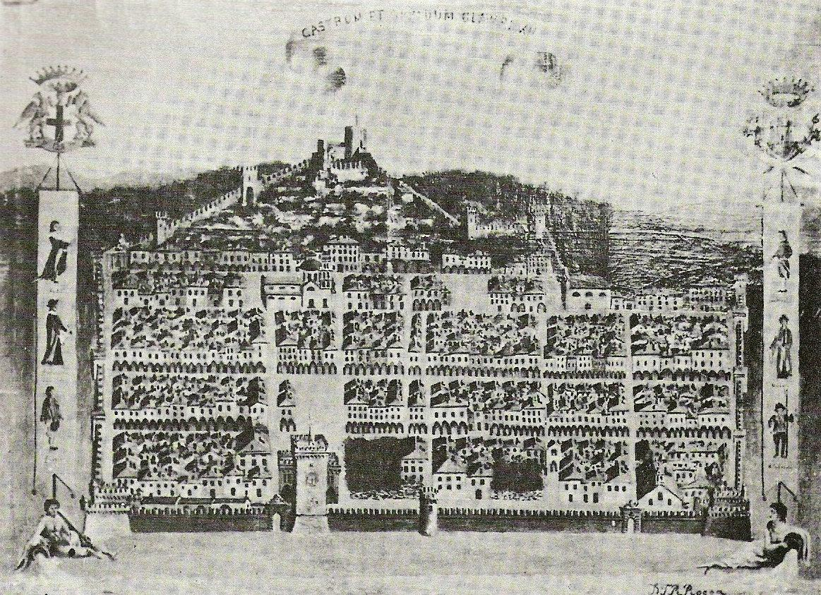 Mappa del medioevo raffigurante la Cittadella di Chiavari